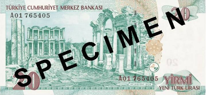 20 YTL arka